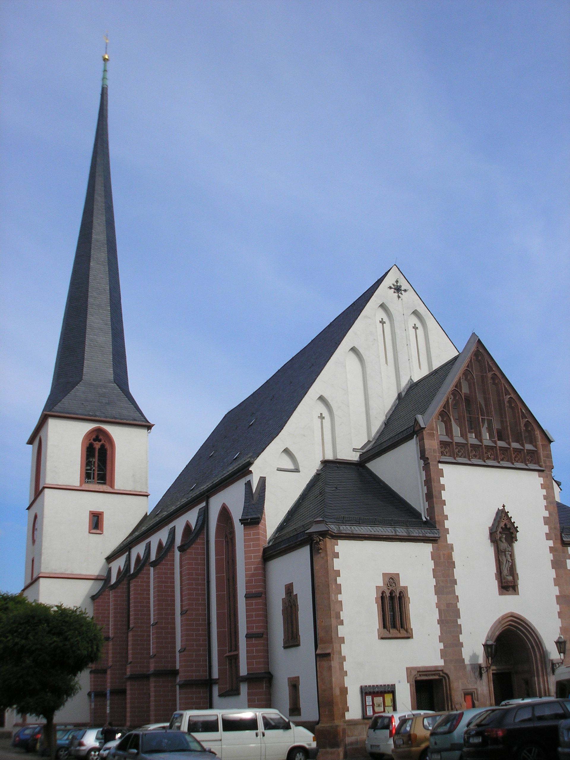 Die Stadtkirche in Crimmitschau (Sachsen).